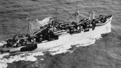 Ship